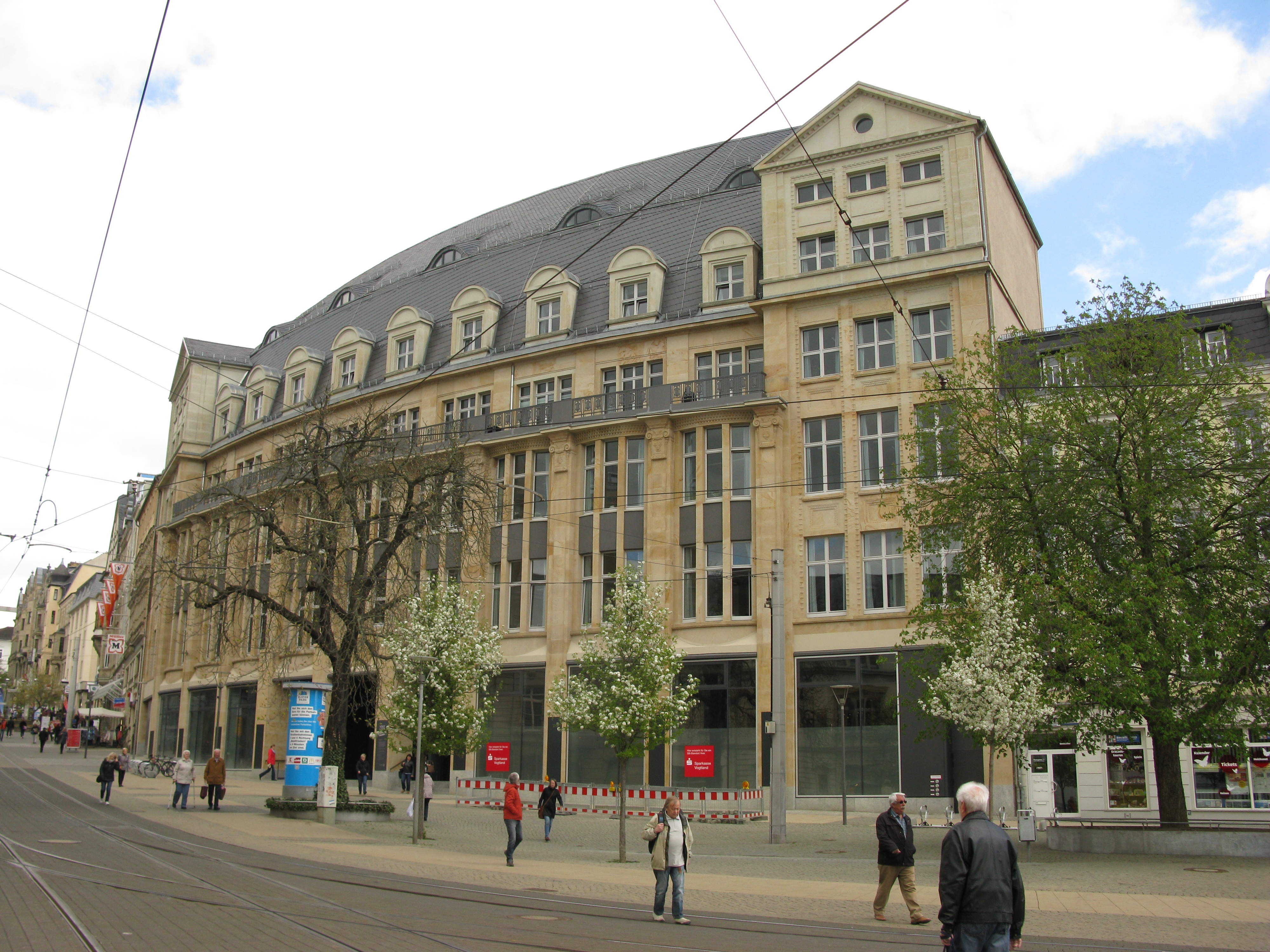 Das Landratsamt des Vogtlandkreises am Postplatz in Plauen.